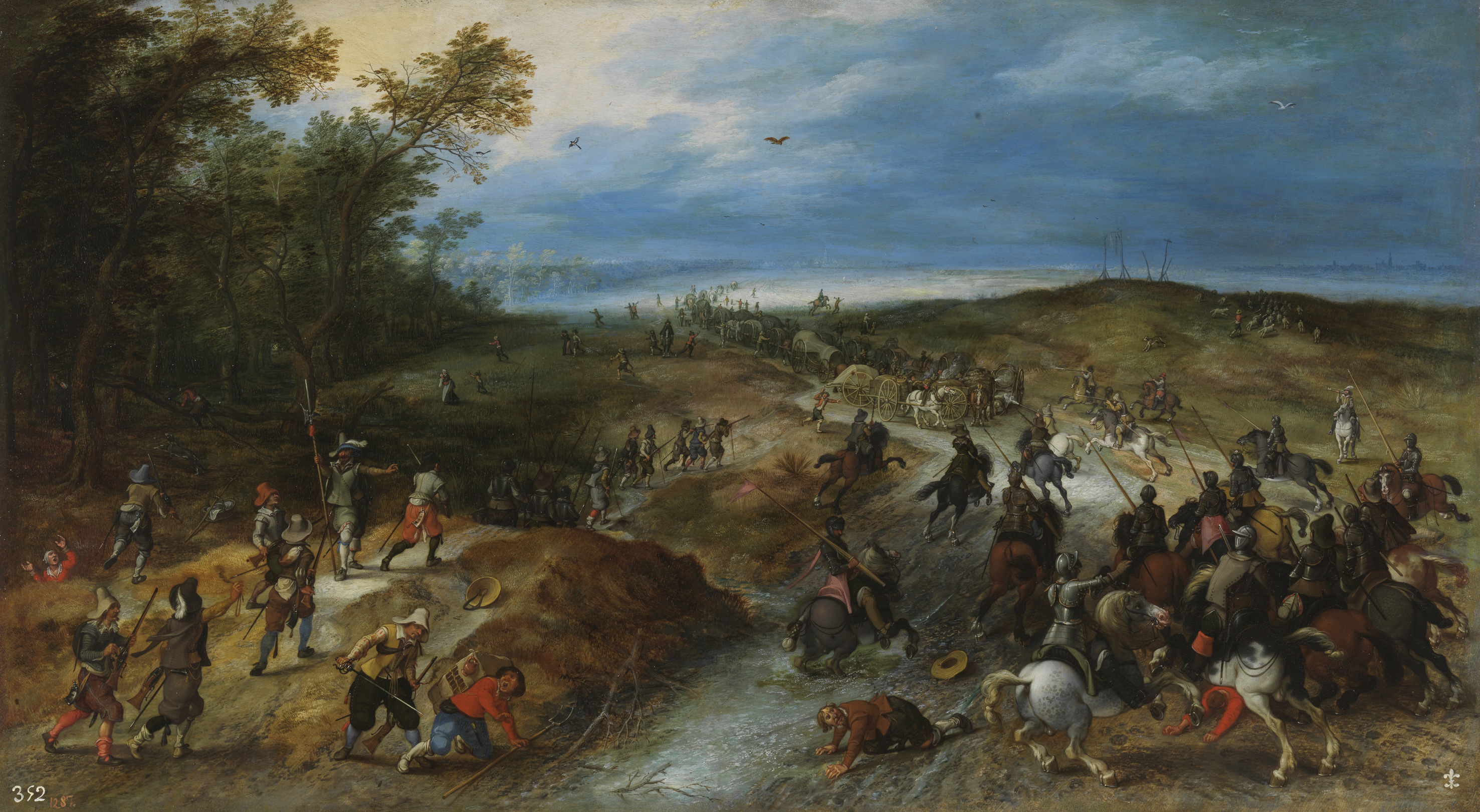 Soldados, a pie y a caballo, avanzan hacia el convoy que se aproxima desde la lejanía; los grupos, más compactos de lo habitual en Sebastián Vrancx, ganan en unidad estructural, sin perder por ello en encanto narrativo. Un pastor con su rebaño de ovejas y un vendedor agredido por un soldado irrumpen, de forma pintoresca, en la contienda, que provoca el ejército regular, a las órdenes de un suboficial, identificado por el alarde y el clarín. Vrancx trata el tema, reflejo de la realidad de fines de siglo, en su aspecto narrativo y con una factura laminada y cuidada (Texto extractado de Díaz Padrón, M.: El siglo de Rubens en el Museo del Prado: catálogo razonado de pintura flamenca del siglo XVII, 1995, p. 1568).